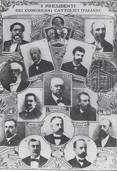 Presidentes de los Congresos católicos (Italia)